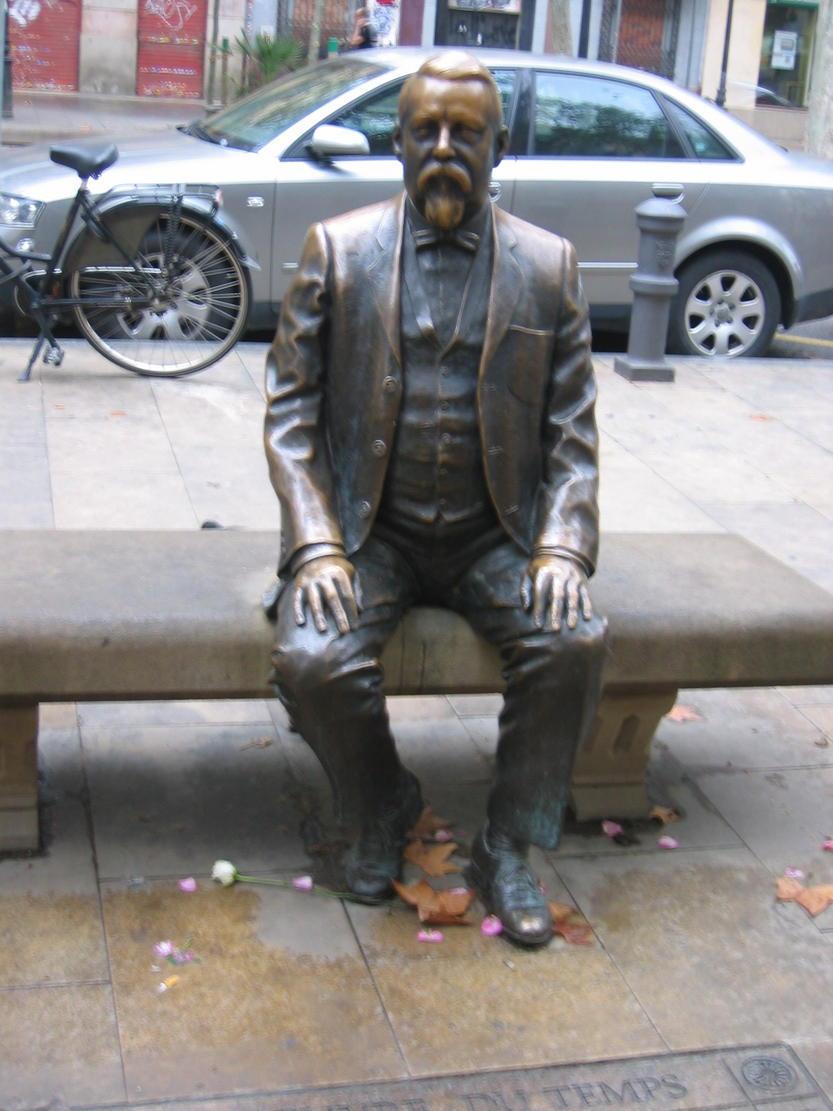 Escultura de bronze on hi apareix Antoni Rovira i Trias. Està situada a la plaça homònima del districte de Gràcia, a Barcelona.